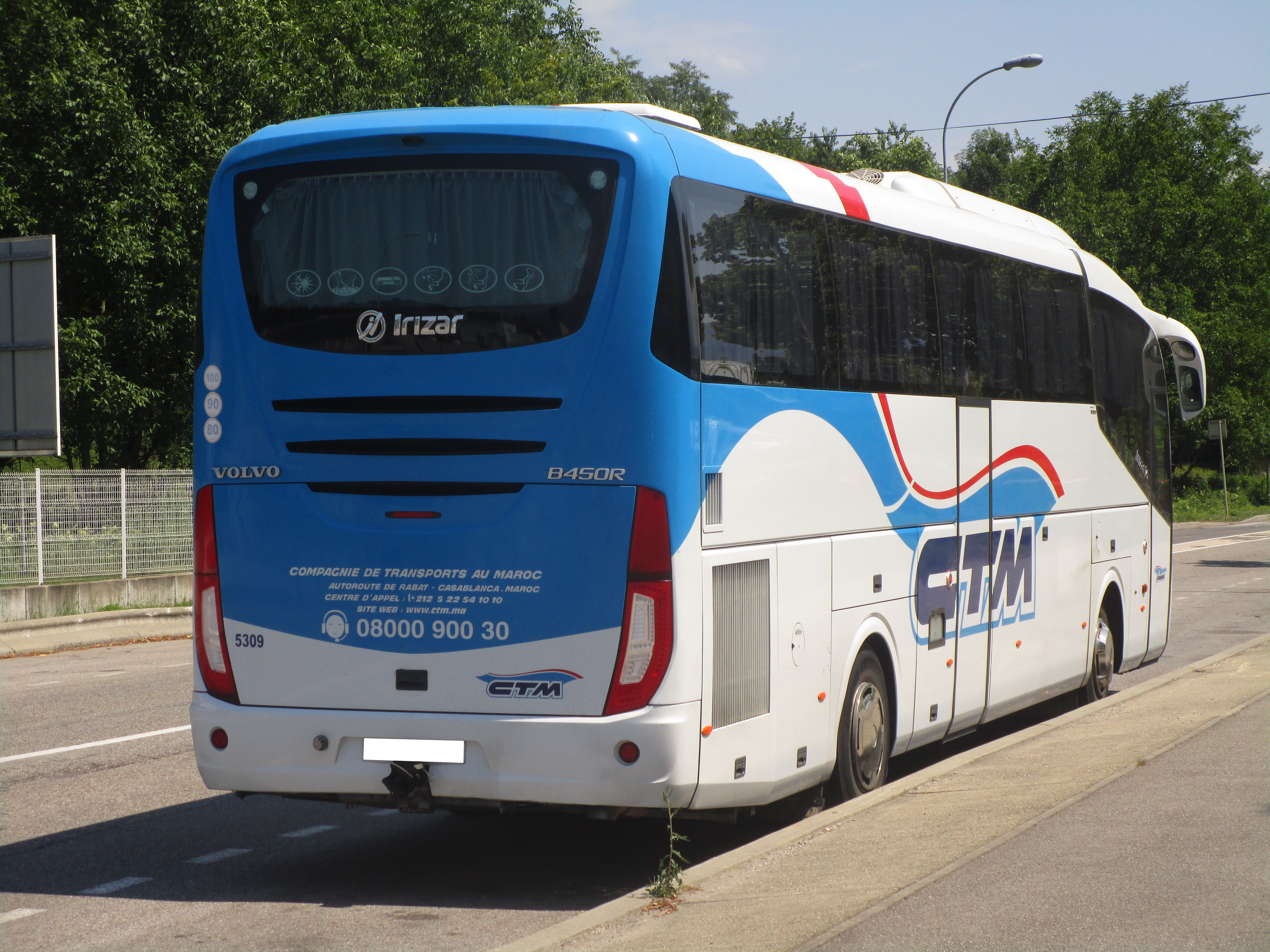 An Irizar i6 (n°5309 of the CTM) in Avenue des Landiers (Chambéry, France) on June 19, 2017.